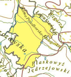 Powiat Włoszczowski na mapie mezoregionów